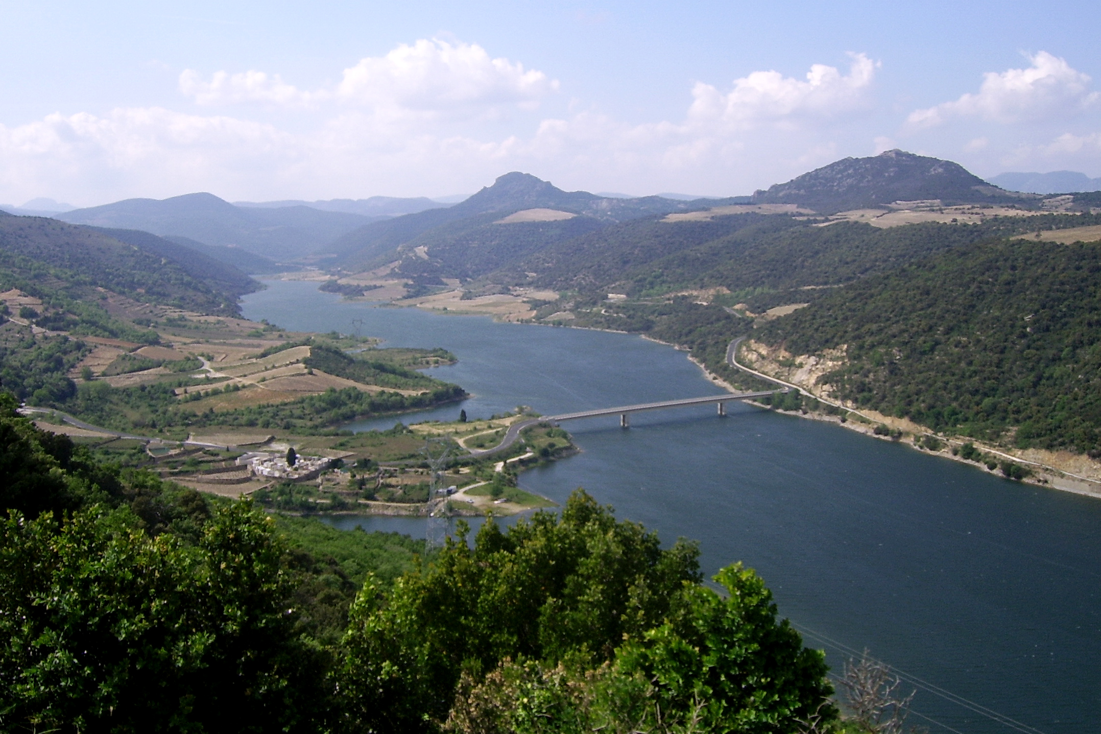 Photo du lac du barrage de Caramany, avril 2006, depuis le belvédère de Caramany A gauche, on peut distinguer le cimetière du village